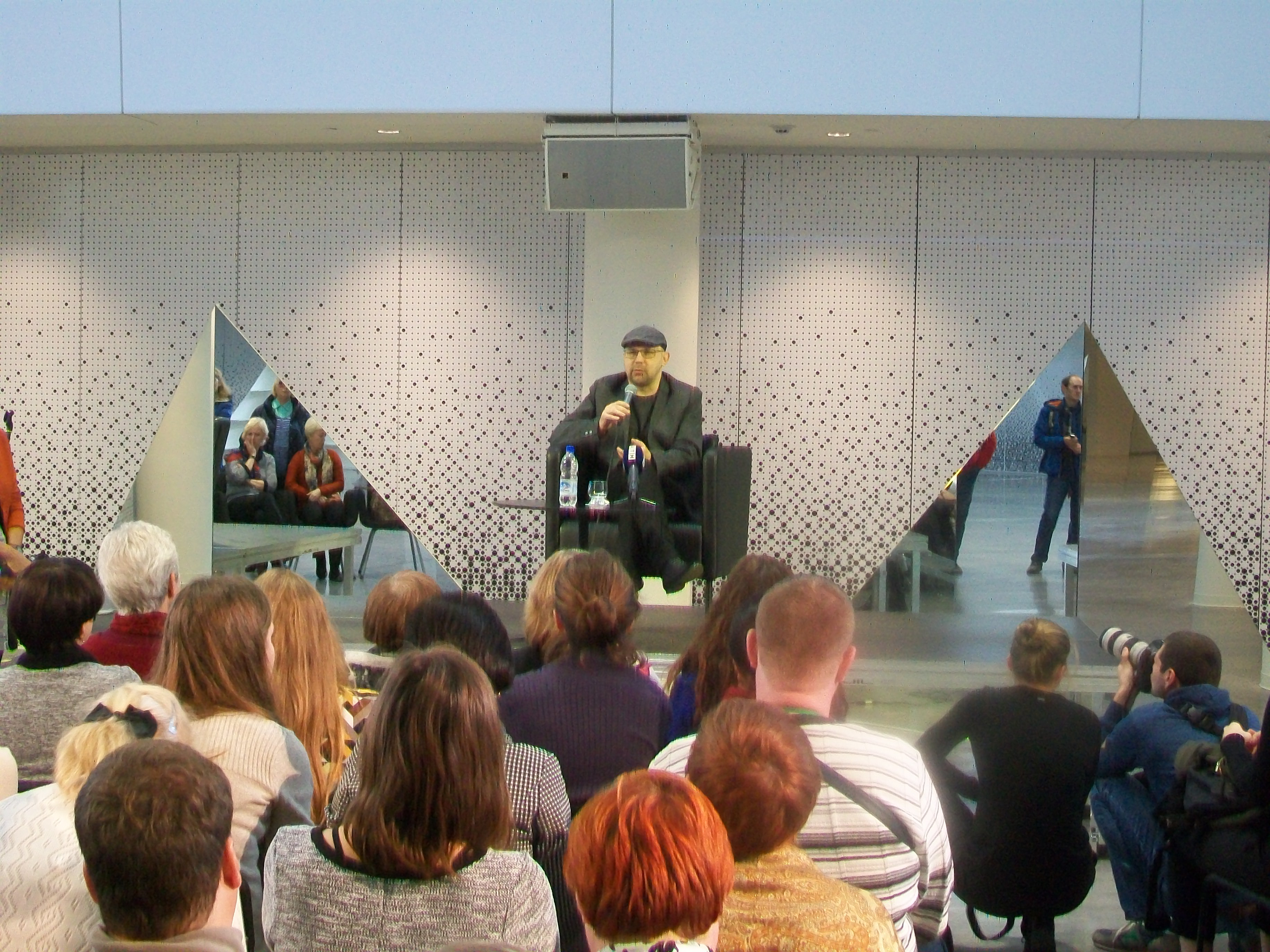 Писатель Алексей Иванов на встрече с читателями в Екатеринбурге, 15 сентября 2016 года. Ельцин-центр